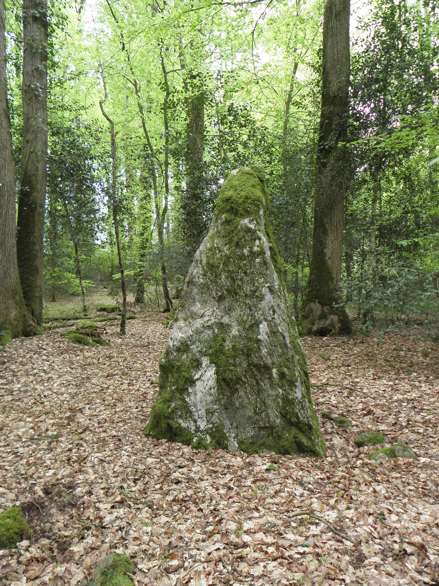 Un des menhirs de la Forêt de Haute-Sève à Saint-Aubin-du-Cormier (35).